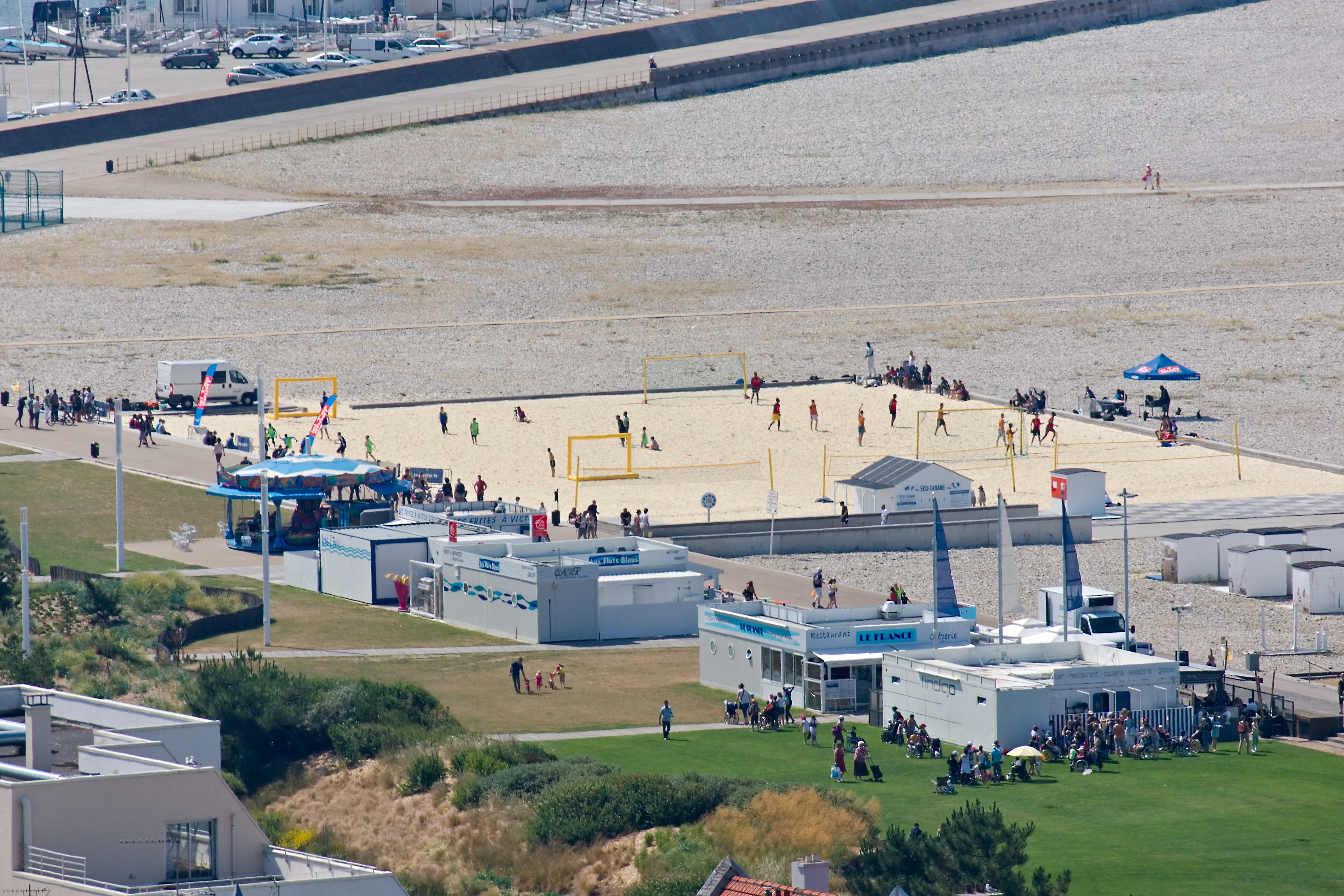 Beach soccer sur la plage du Havre vu depuis l’ancien fort de Sainte-Adresse